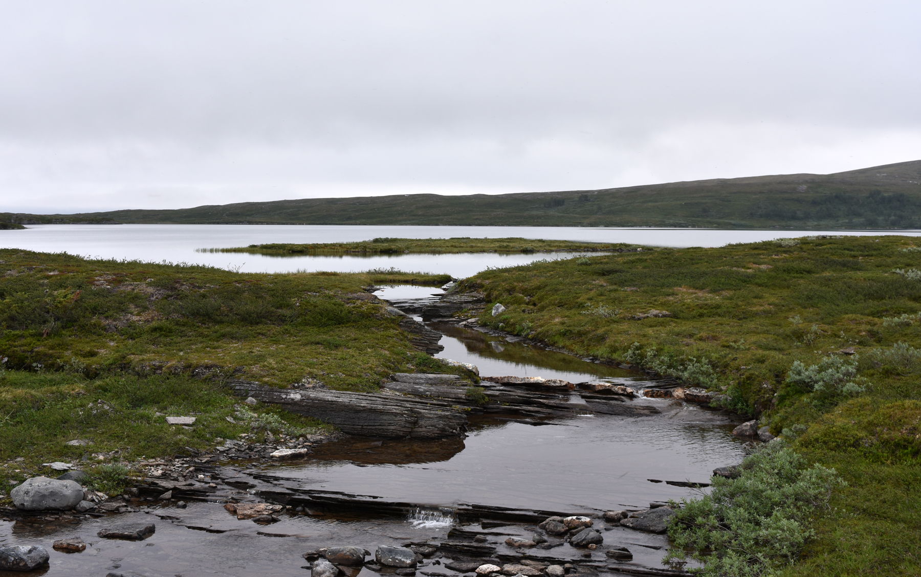 Utloppet av Råggejávrre.